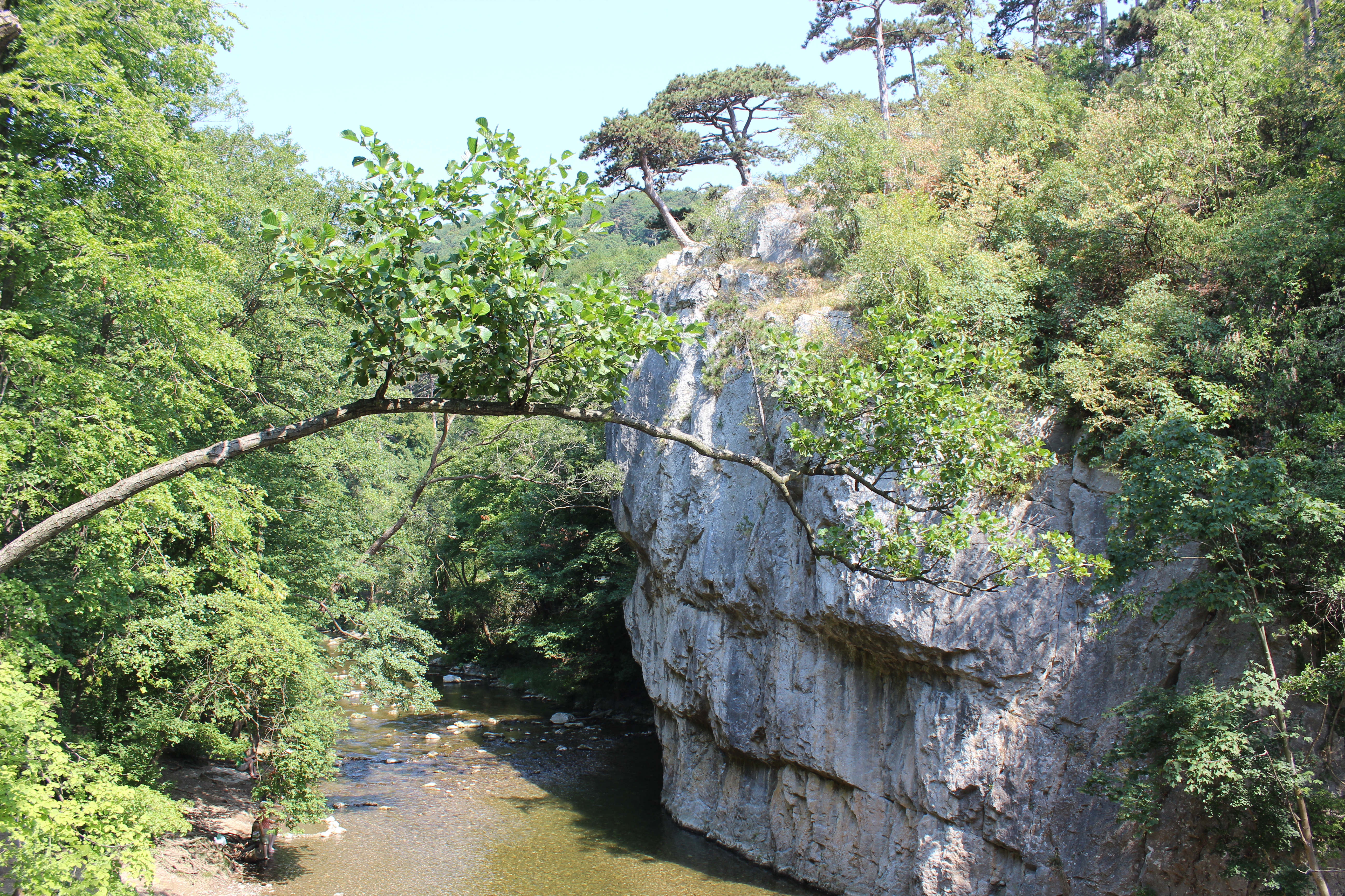 Die Schwechat beim Urtelstein This media shows the natural monument in Lower Austria with the ID BN-001.